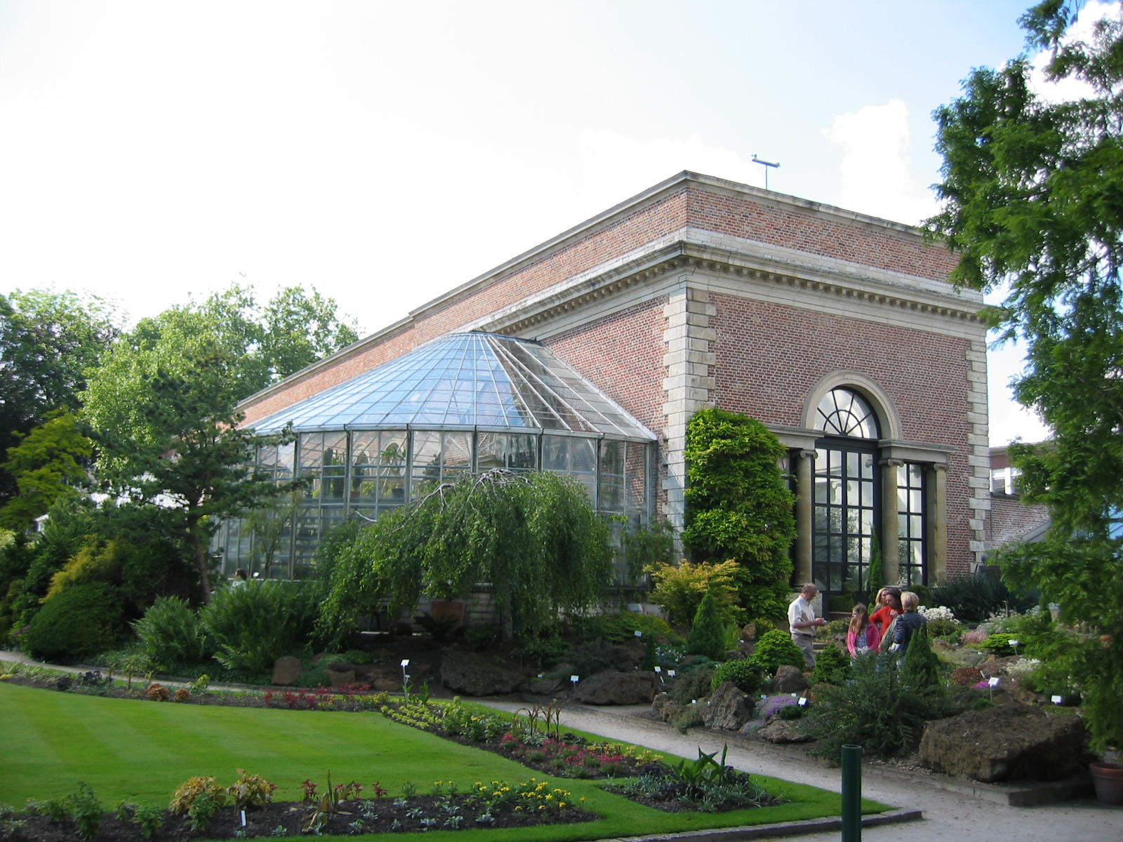 De oranjerie in de Kruidtuin van Leuven (Gemaakt in juni 2006)